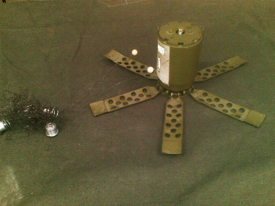 POM-2S AP-Mine